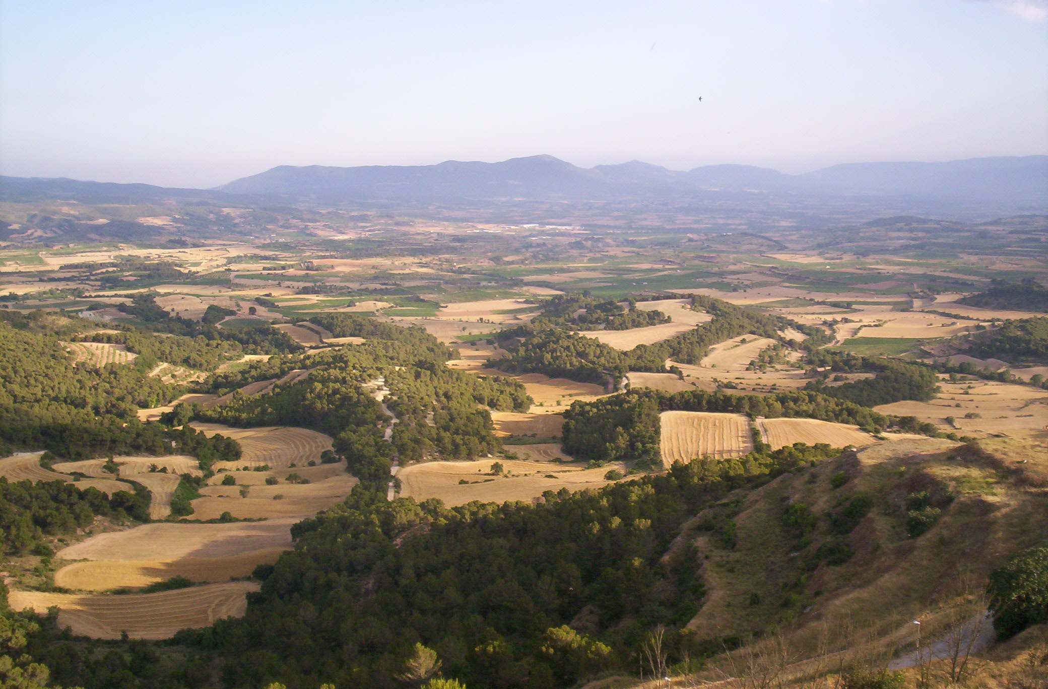 Forès, mirador natural de la Conca de Barberà